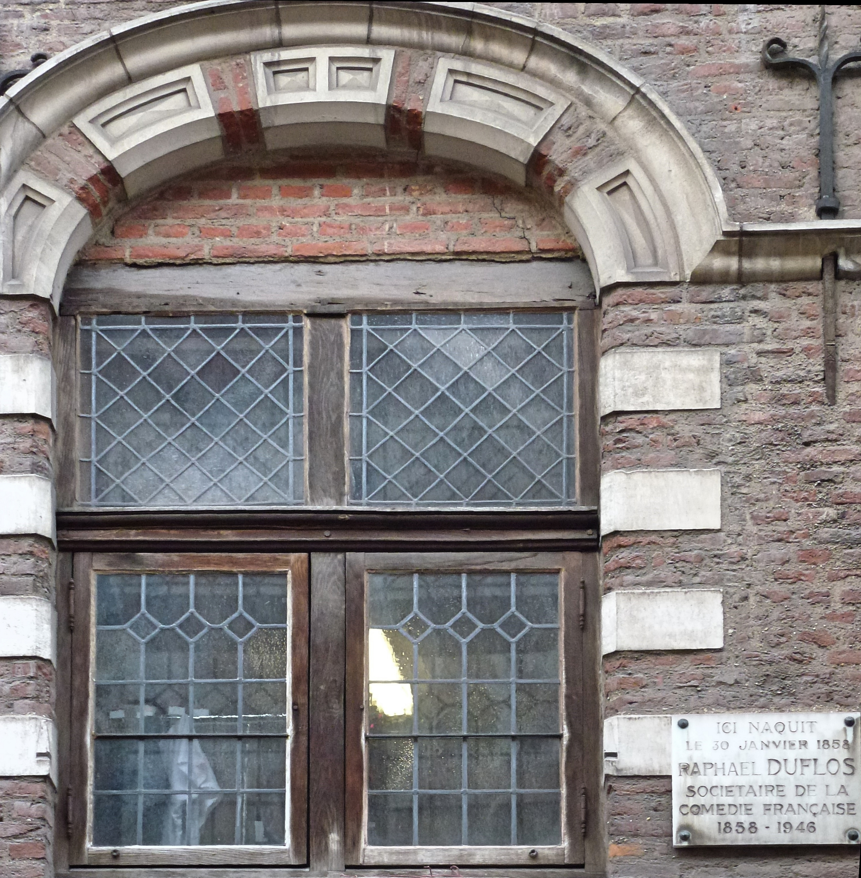 Plaque apposée au n° 12 de la rue de la Monnaie, Lille, où naquit l'acteur Raphaël Duflos (1858-1946), sociétaire de la Comédie-Française.